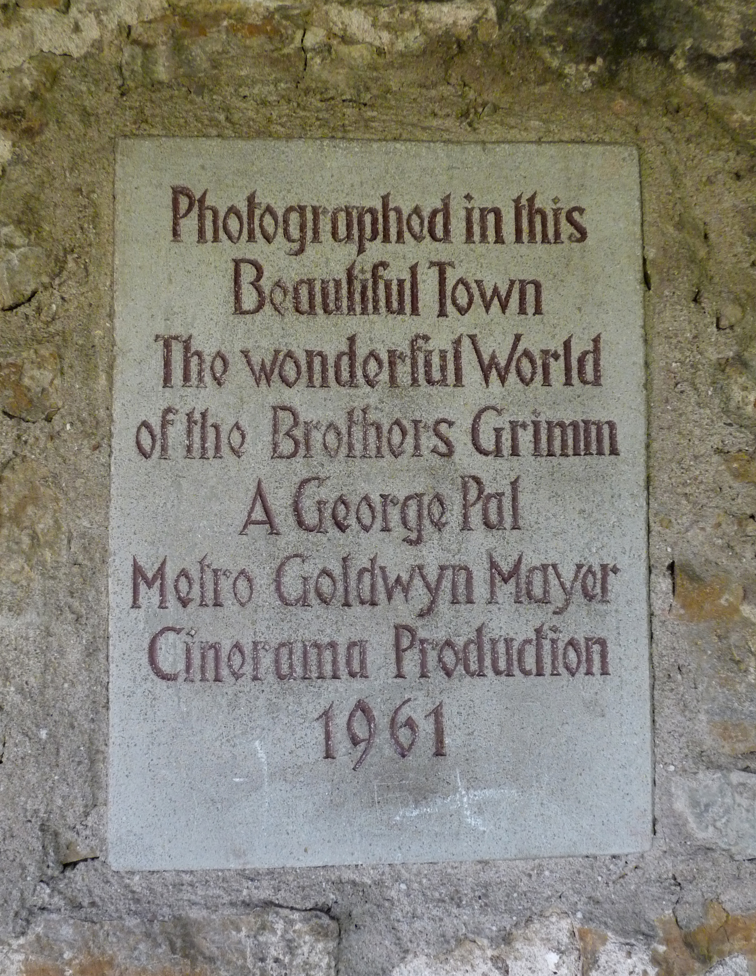 Plaque sur un rempart de Rothenburg ob der Tauber (Bavière) commémorant le tournage dans la ville médiévale d'une production de la MGM, The Wonderful World of the Brothers Grimm (1961).